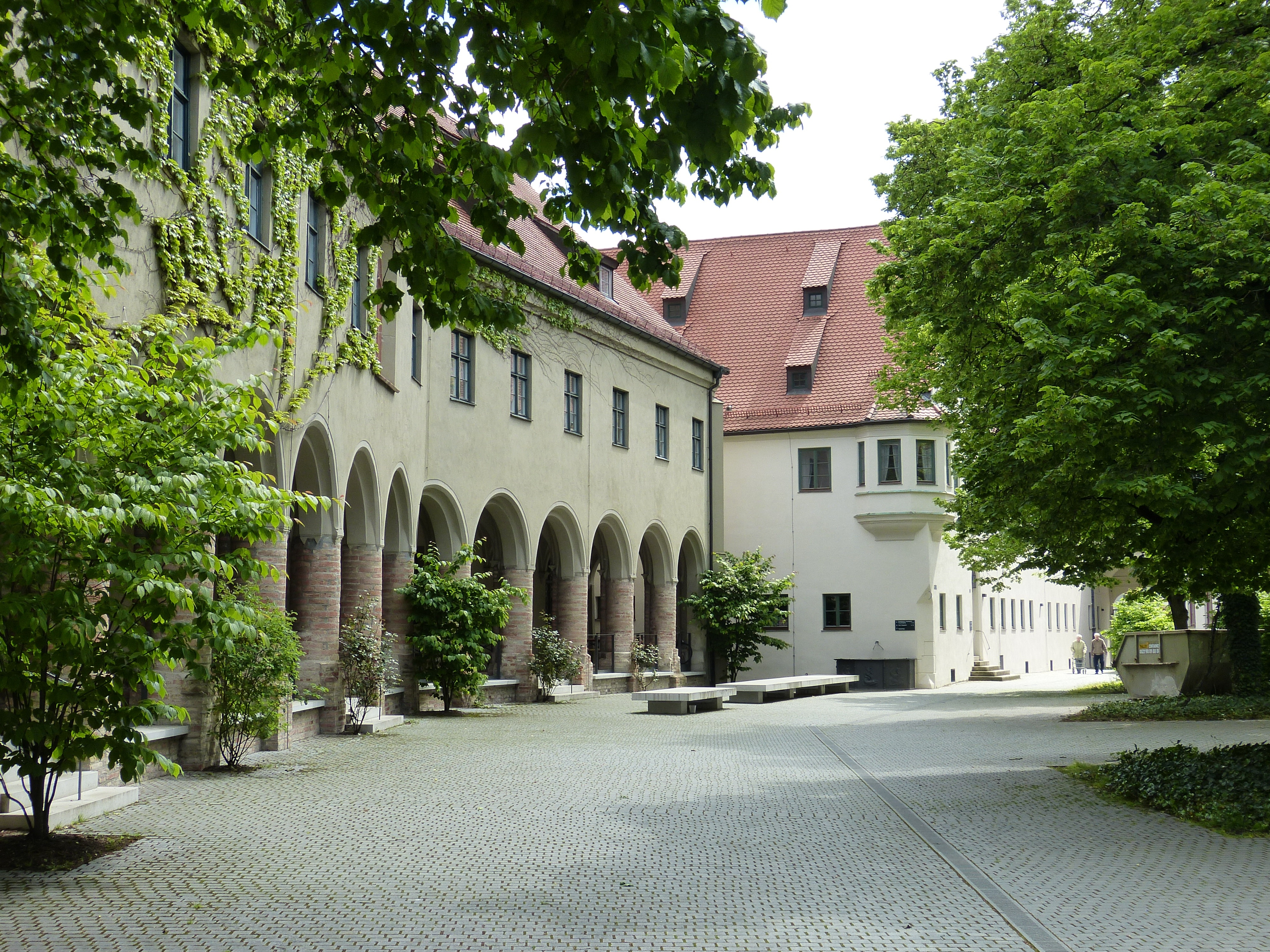 Der Wollmarkt in Augsburg bei St. Margareth.